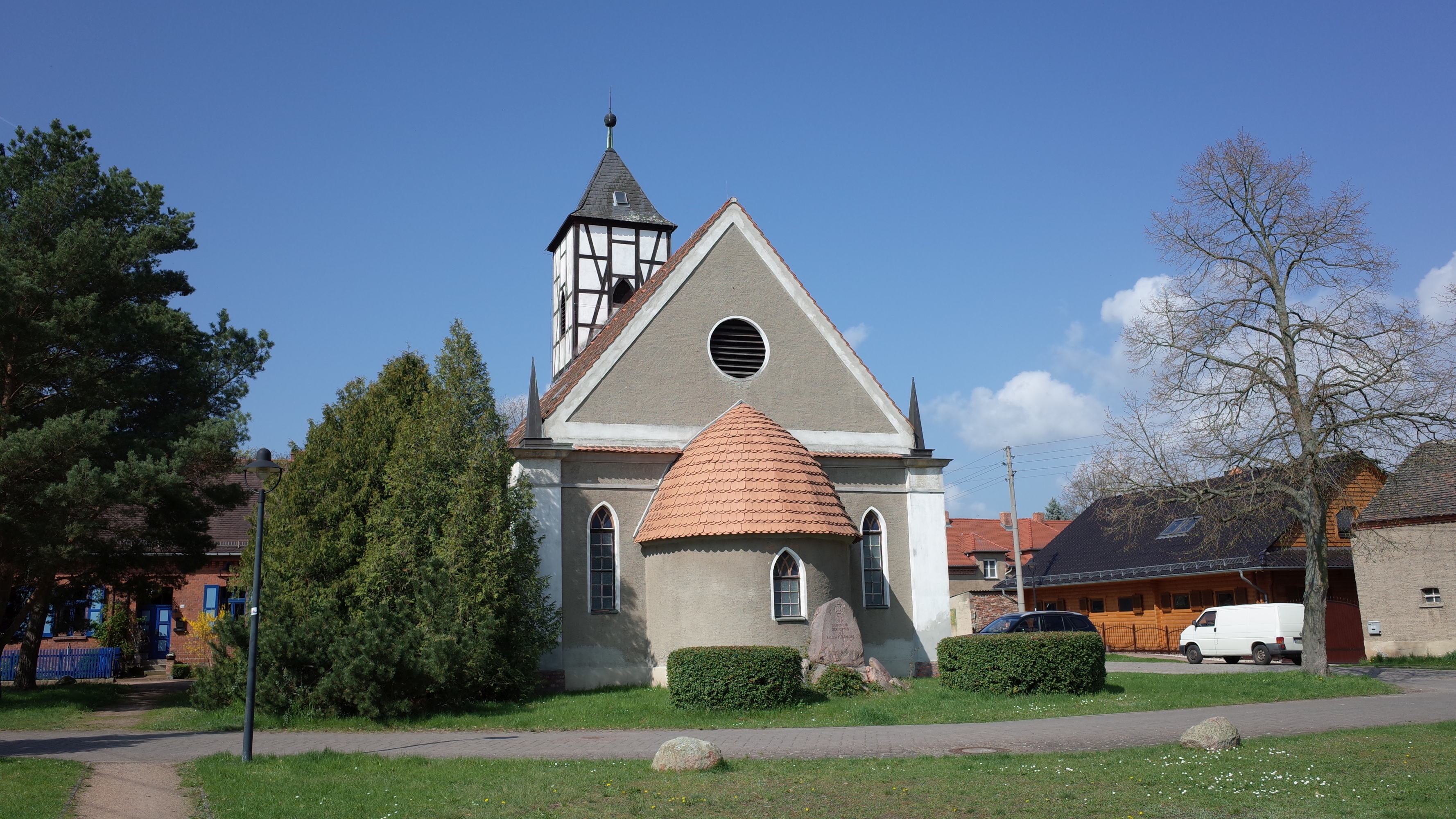 Raguhn-Jeßnitz, Ortsteil Priorau, Kirche mit Denkmal für die Gefallenen der Weltkriege This is a picture of the Baudenkmal (cultural heritage monument) according to the Cultural Heritage Protection Law of Saxony-Anhalt with the ID 094 80978